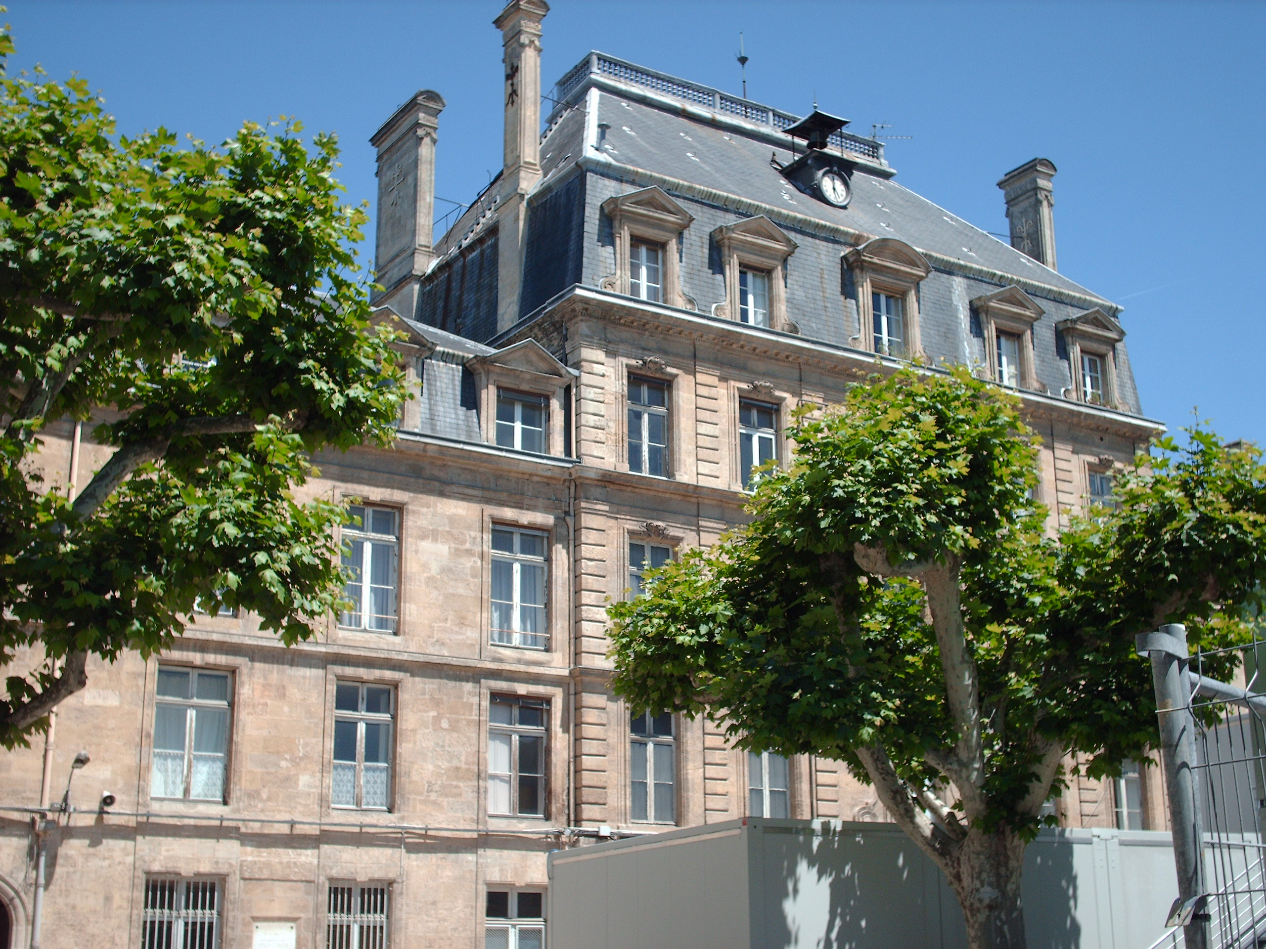 Entrée de la cour principale du lycée Michel Montaigne à Bordeaux.